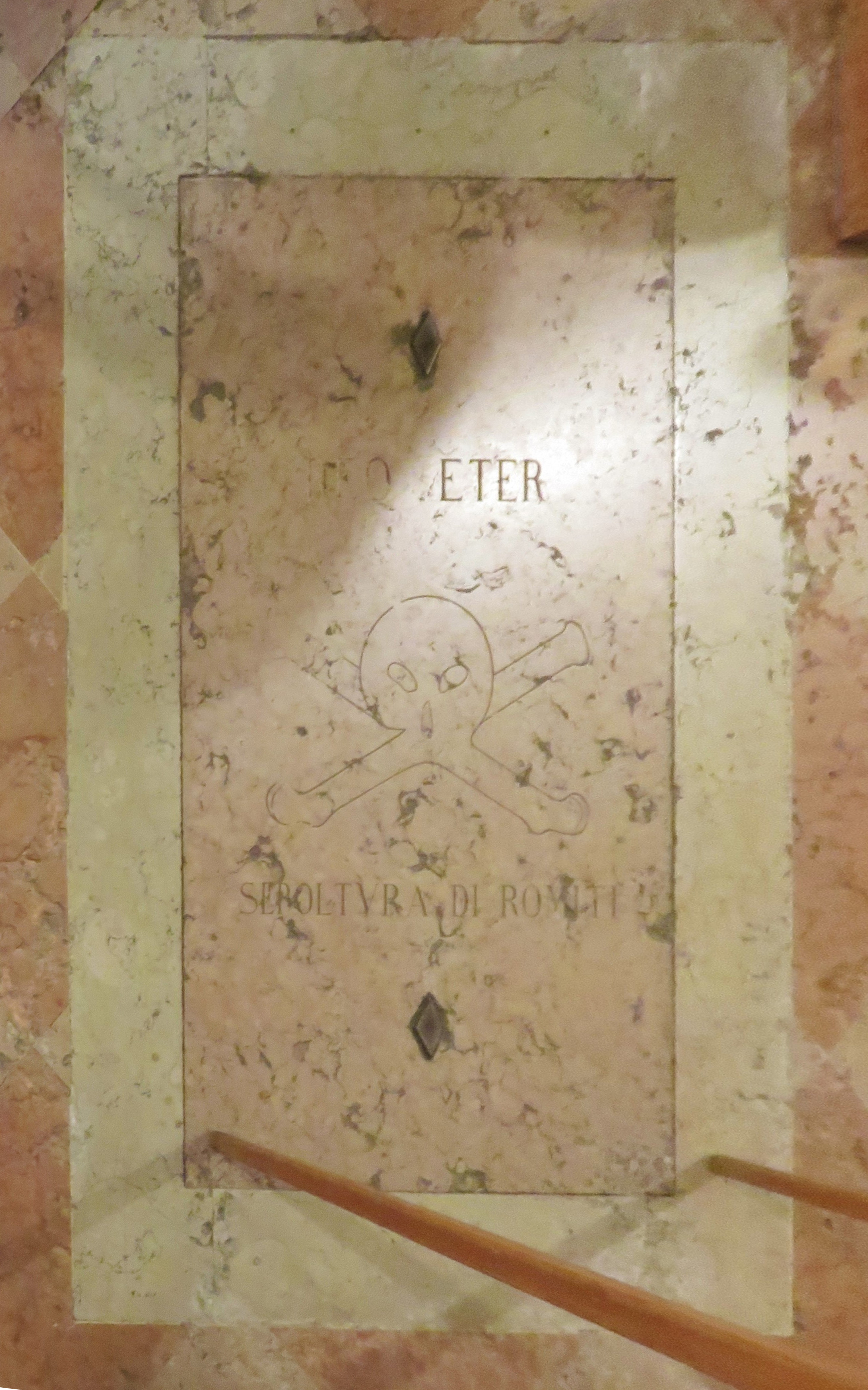 Interno del santuario della Madonna del Monte. Lastra tombale sul pavimento all'ingresso del santuario